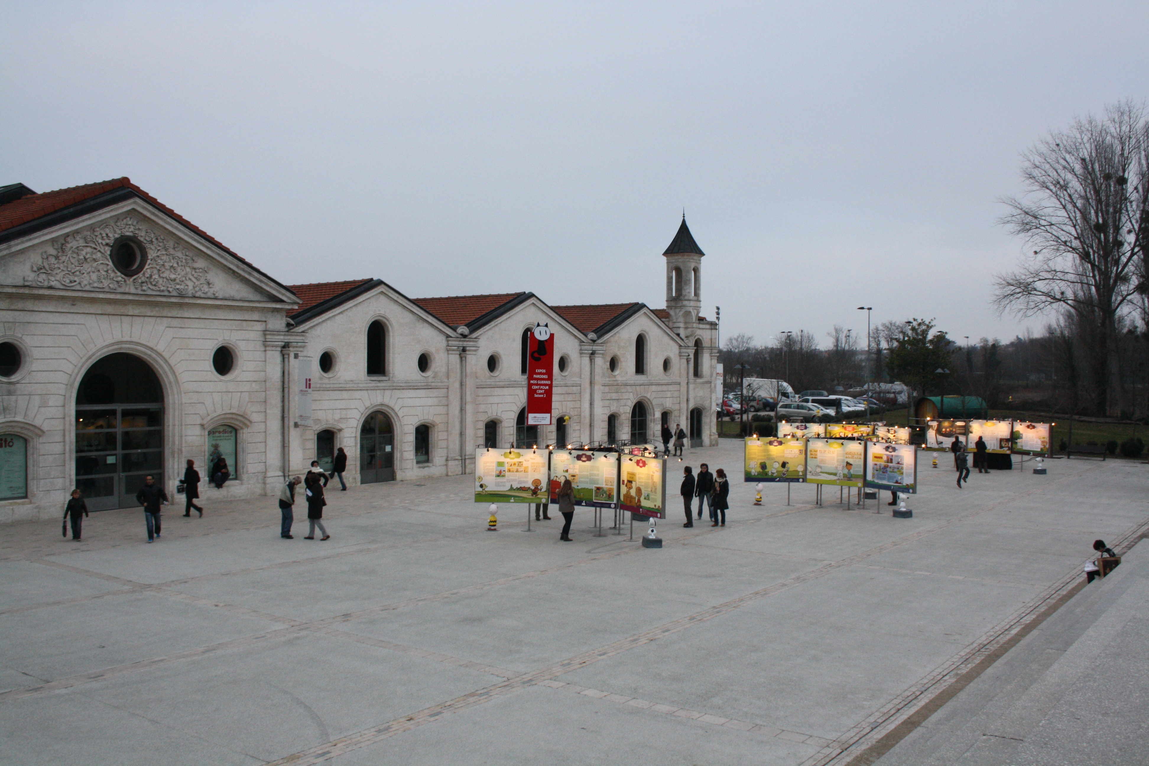 L'exposition Snoopy, devant le musée de la BD, organisé à l'occasion du festival de la BD d'Angoulème 2011.